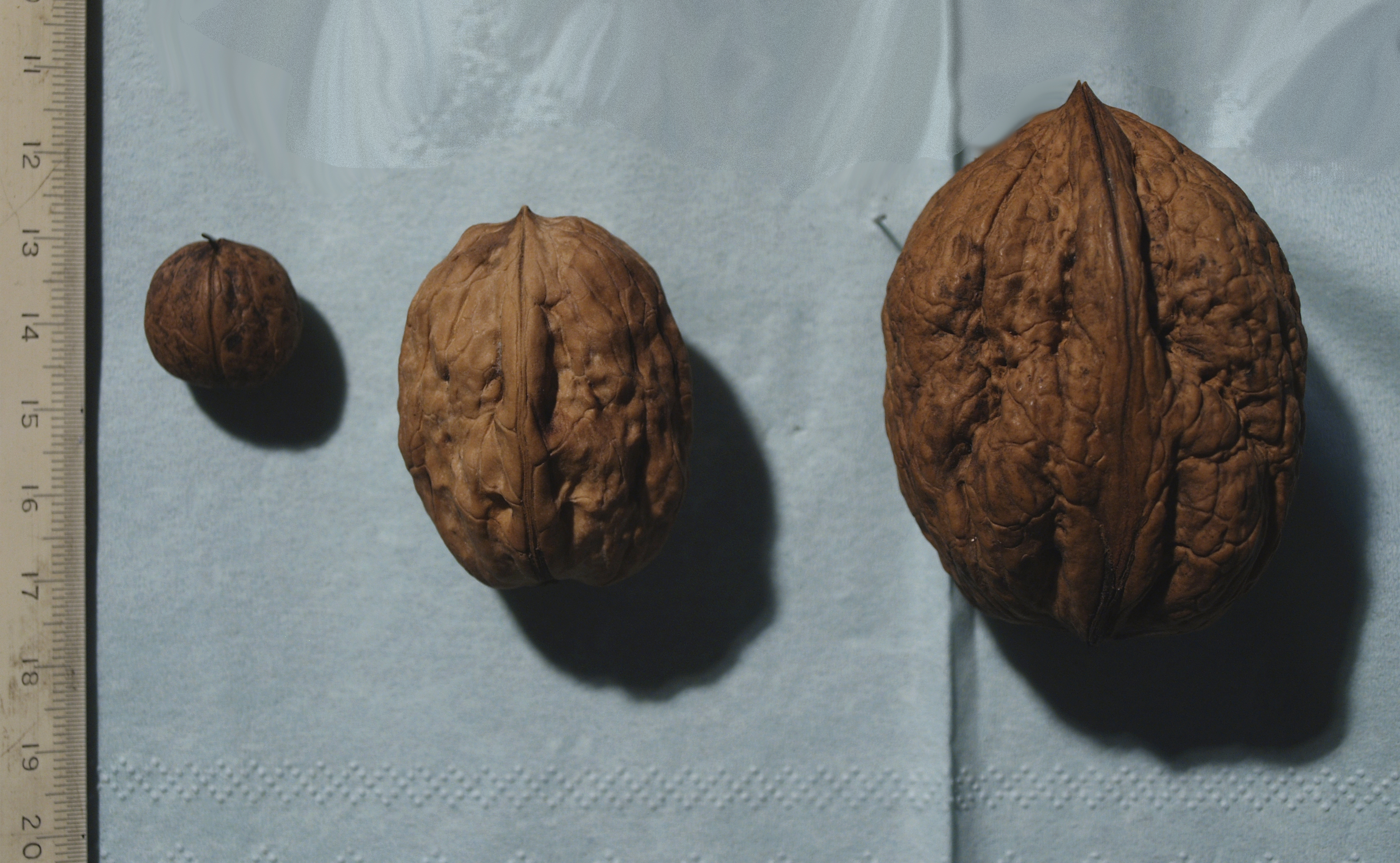 Walnüsse drei verschiedener Bäume